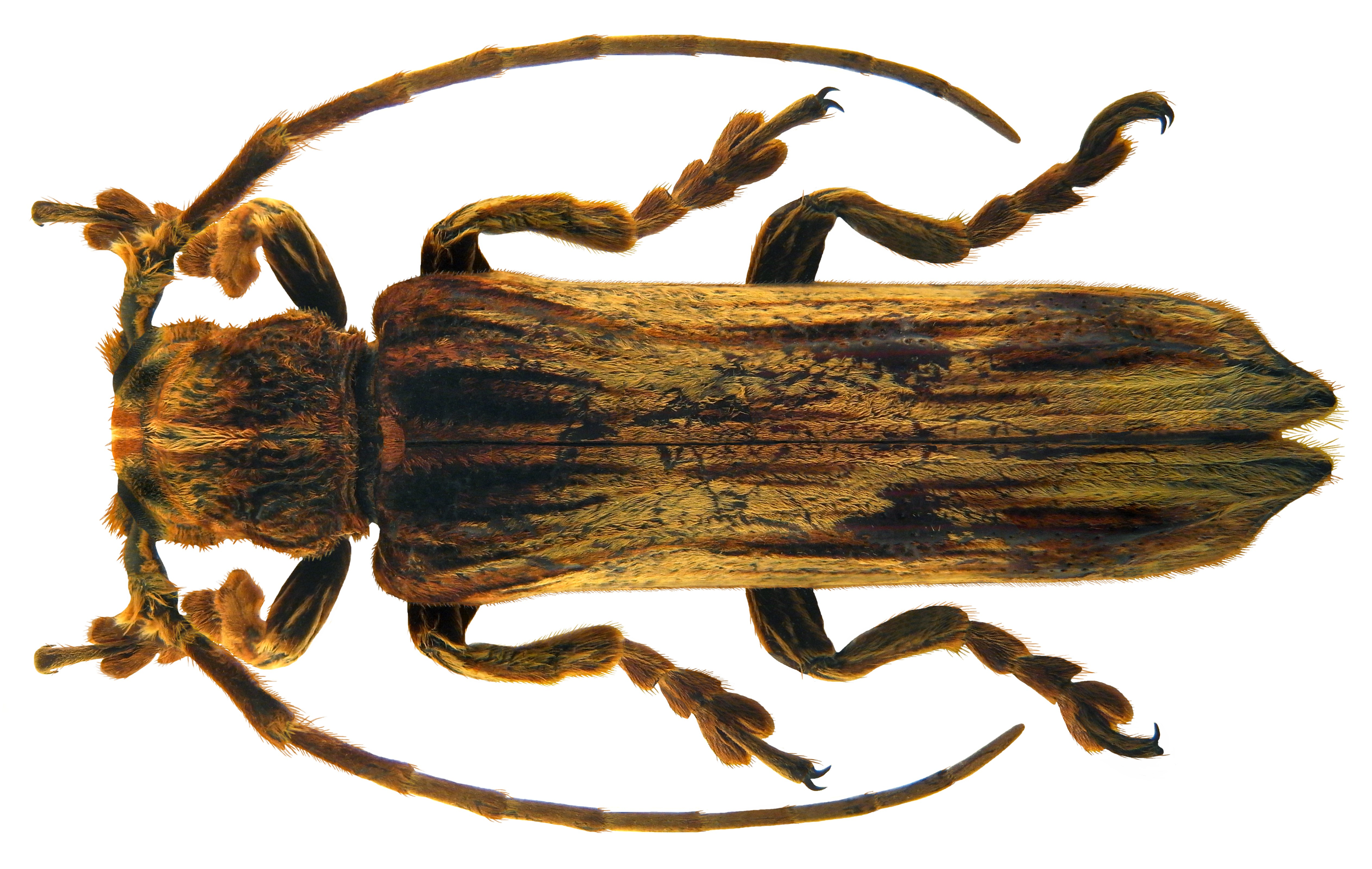 Familie: Cerambycidae Groesse: 34 mm Fundort: Kambodscha, Batdambang, Bo in Tehrnierng leg. Lay Hourt Dang, 1986; det. J.Scheuern, 1990 Photo: U.Schmidt, 2010